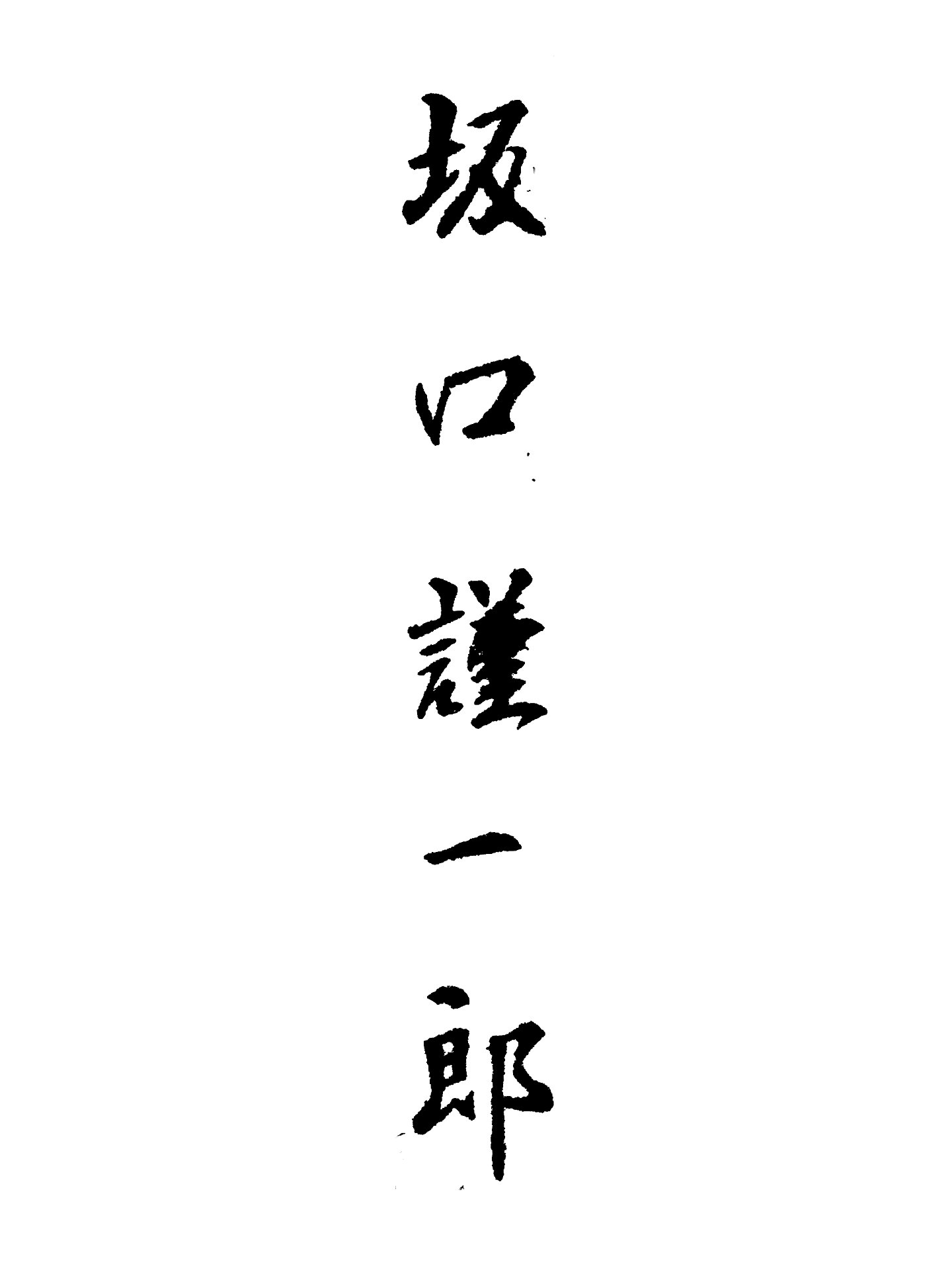 坂口謹一郎博士・東京大学名誉教授のサイン